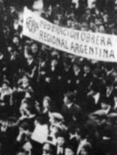 Manifestación de la FORA. Argentina. ca. 1915